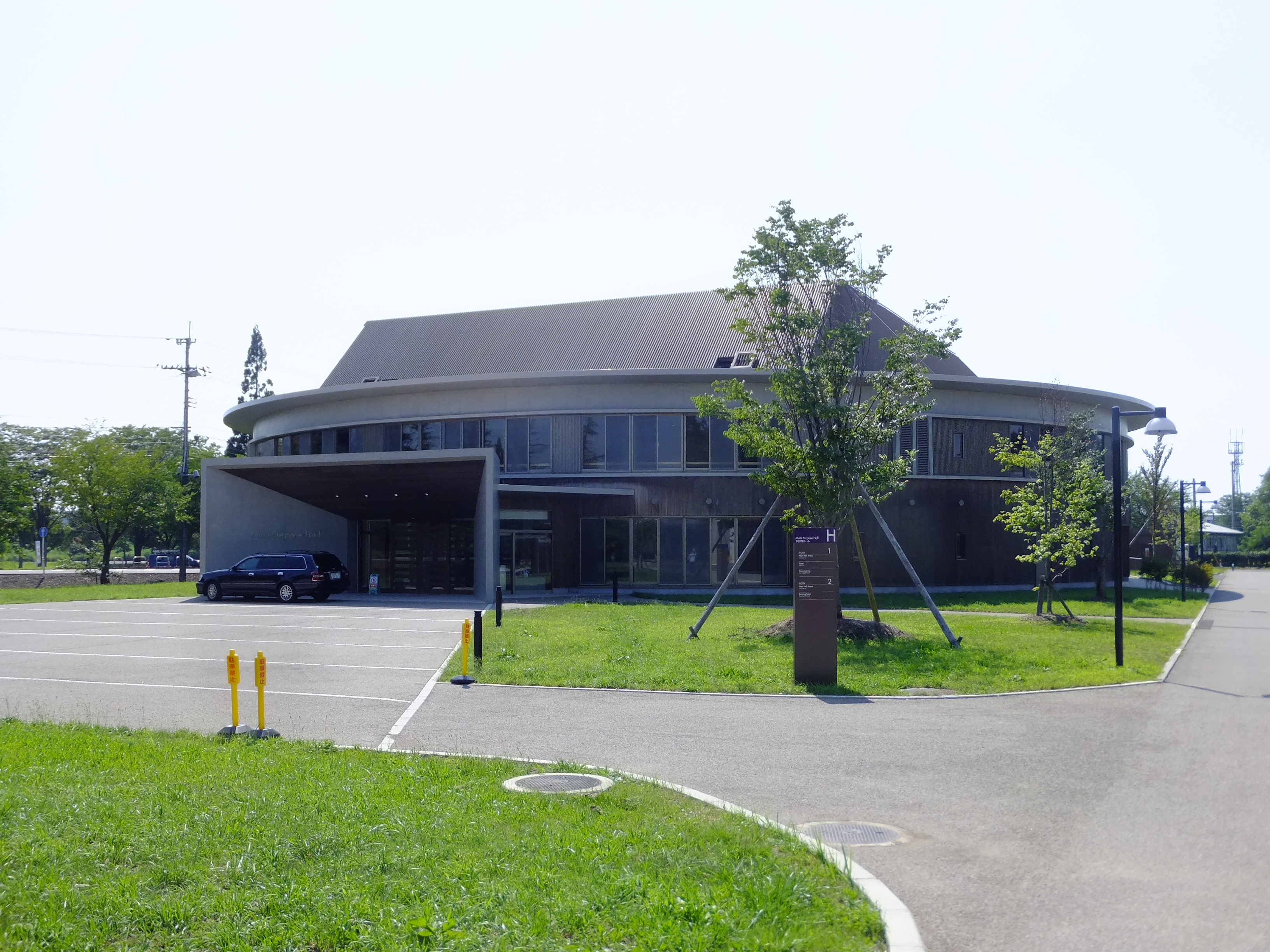 国際教養大学多目的ホール